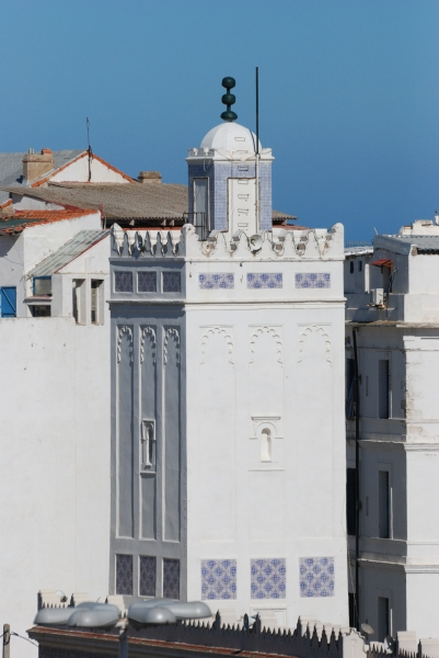 Minaret de la Grande Mosquée d'Alger (Djamâa El Kebir), Algérie.